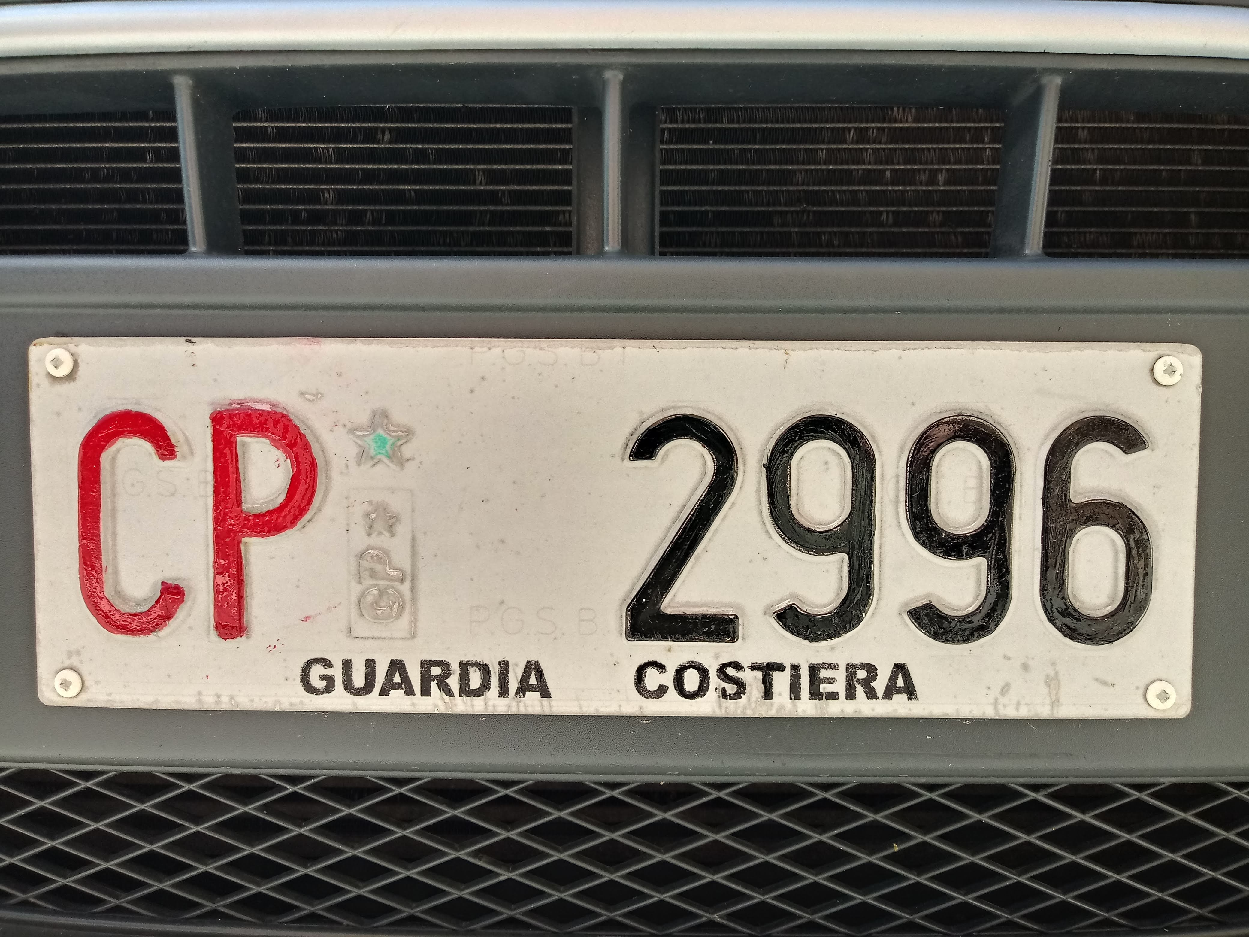 La foto rappresenta la targa anteriore di un furgone Fiat con sigla CP rossa del Corpo Capitaneria di Porto - Guardia Costiera; è stata scattata dal sottoscritto in data 16/07/2019 presso la sede dell'autorità portuale di Venezia - quartiere S. Marta.